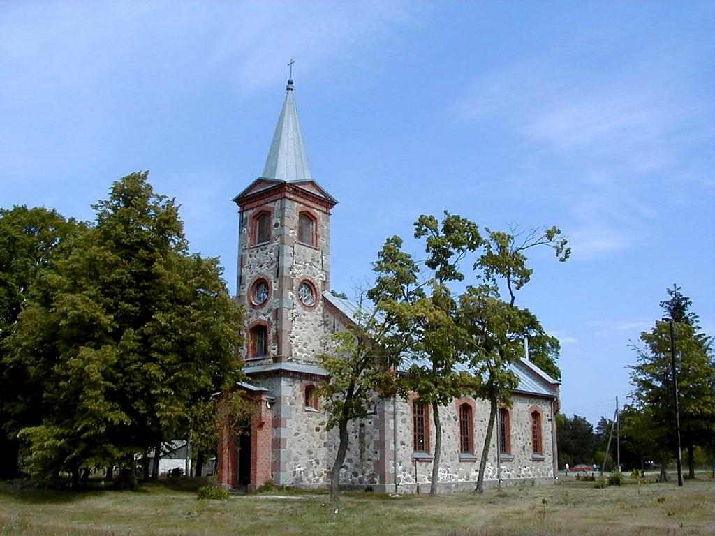 Kolkas baznīca 2000-06-24